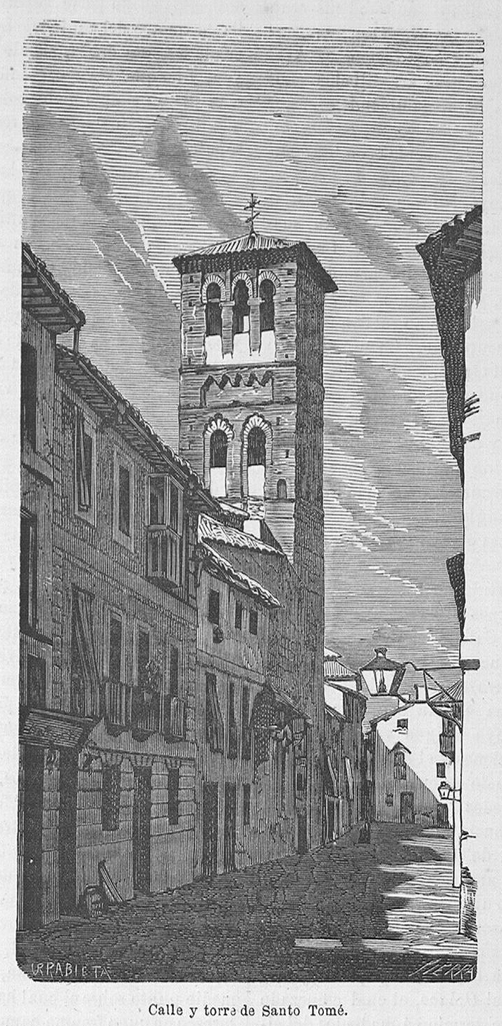 Calle y torre de Santo Tomé, Toledo, España.